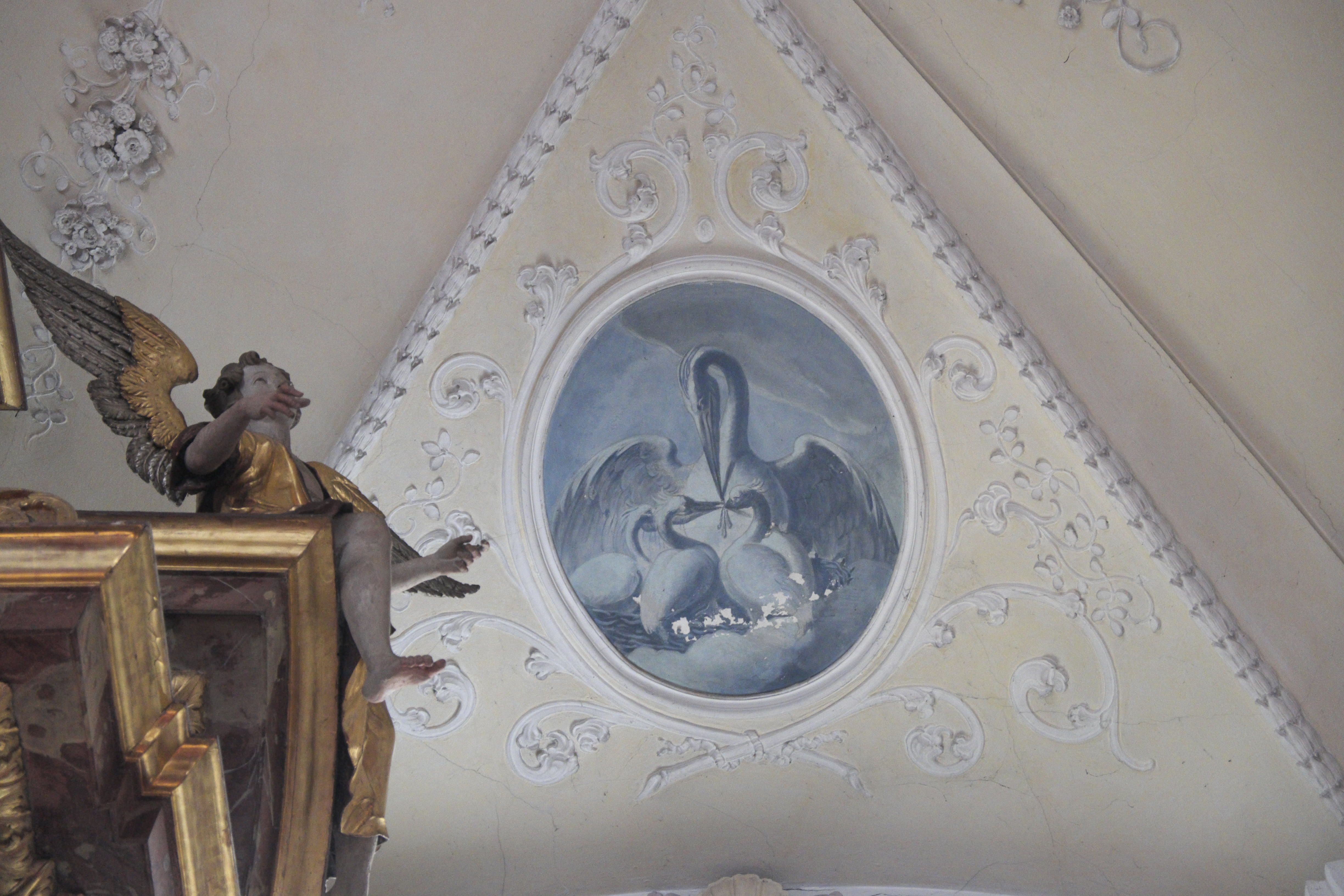 Katholische Klosterkirche der Pauliner St. Peter und Paul, ehemalige Wallfahrtskirche St. Salvator, in Mainburg im niederbayerischen Landkreis Kelheim (Bayern/Deutschland), Stuckdekor von 1906, Deckenmalerei von Georg Halter, von 1906; Medaillon mit Grisaille-Malerei; Darstellung: Pelikan, der seine Jungen nährt